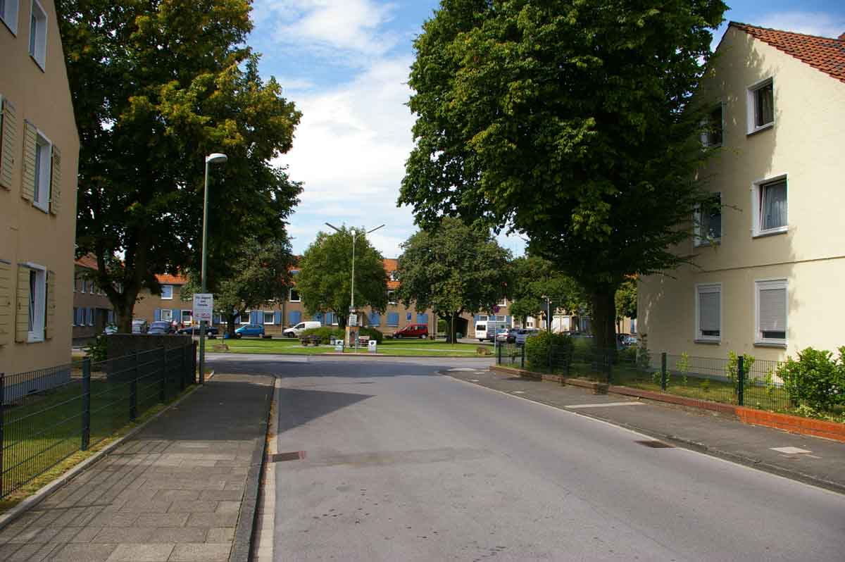 Martinsplatz